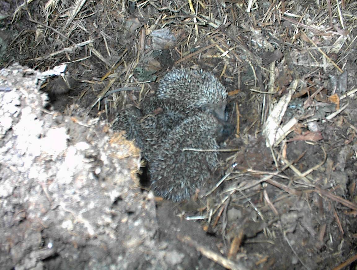 Egelnest met 4 jongen, verdere close-up, eigen foto, GNU Free Documentation License